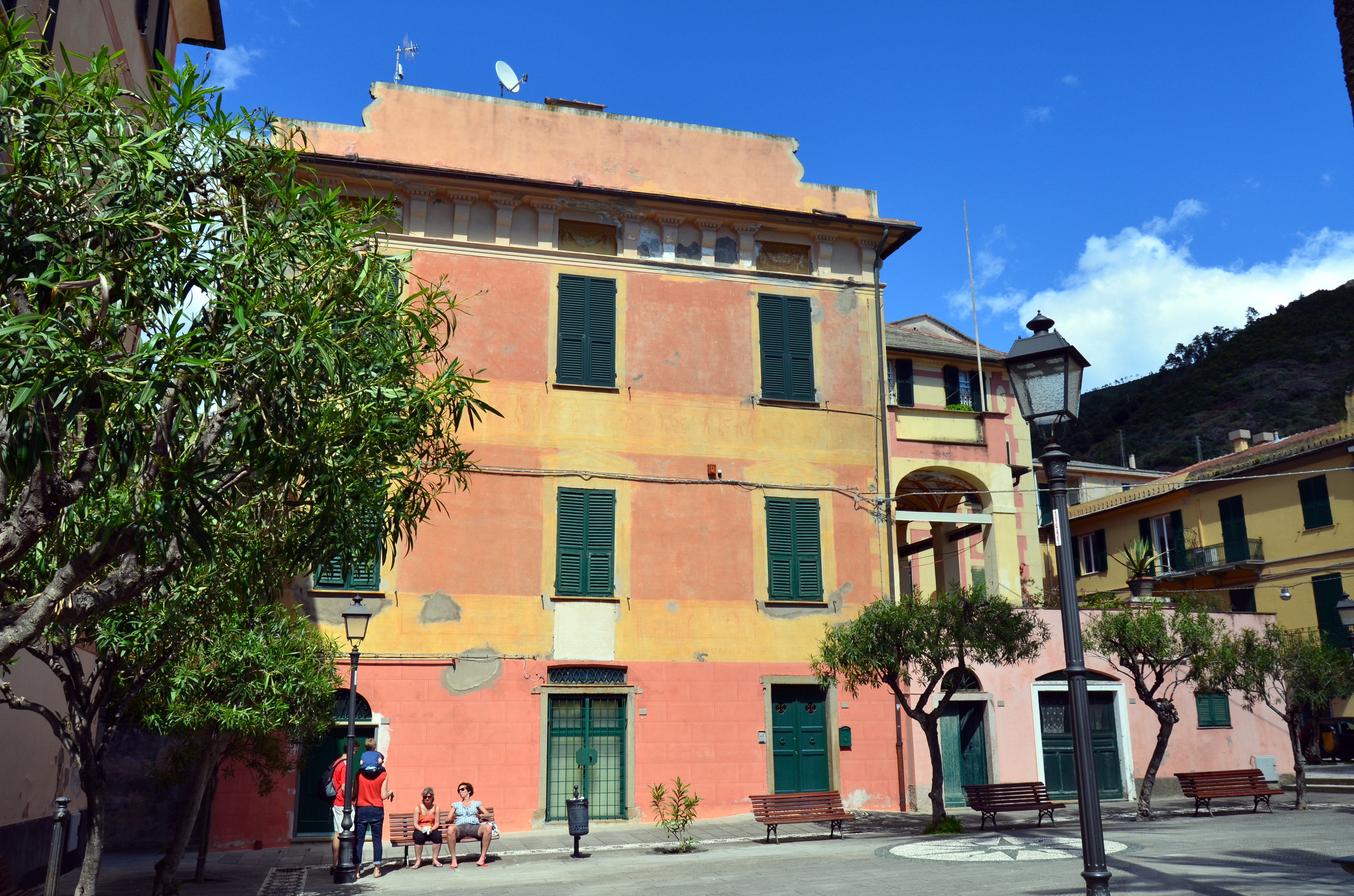 Palazzo Paganetto, Bonassola, Liguria, Italia.